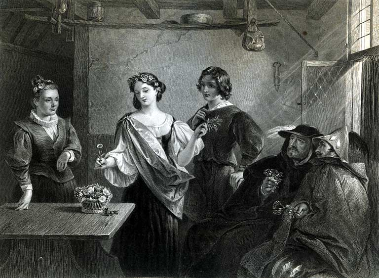 Florizel and Perdita